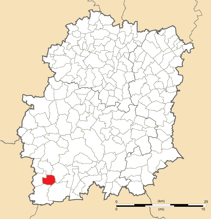 Carte de position de Monnerville en Essonne (91)